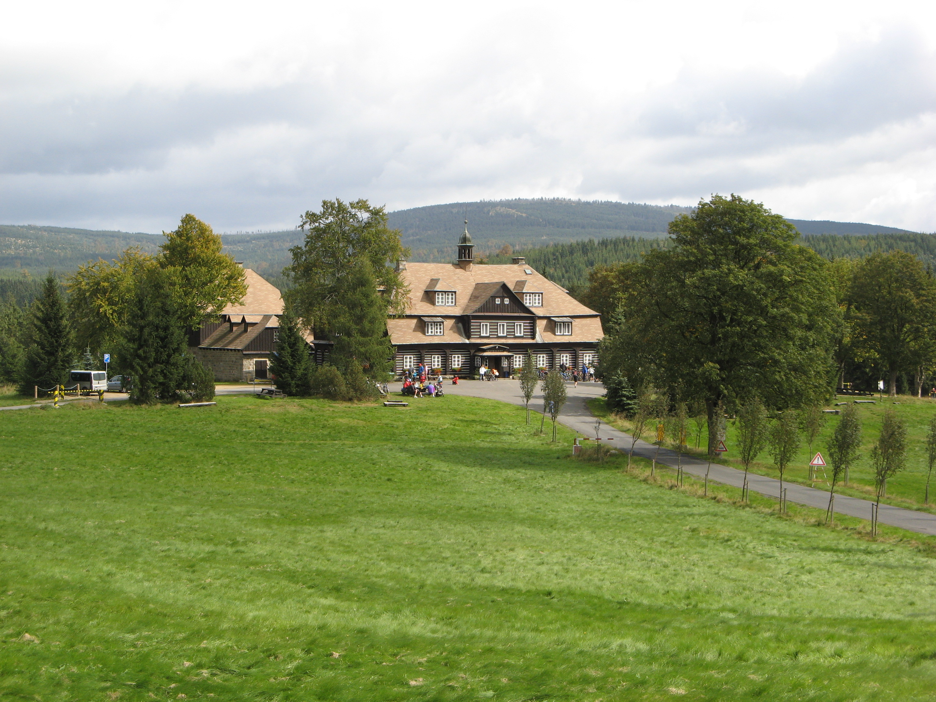 Nová Louka, Jizera Mountains, Czech Republic